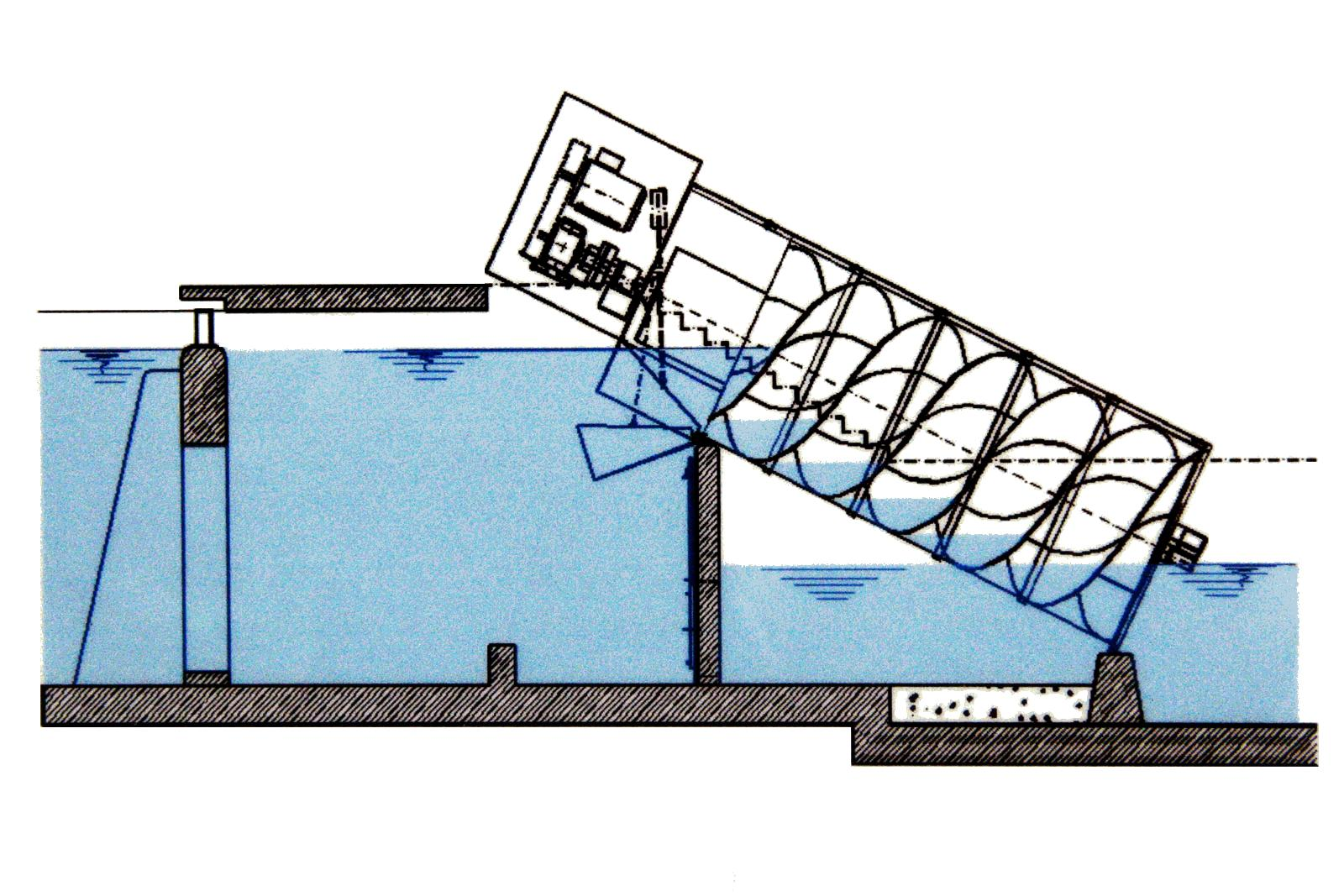 Funktionsprinzip einer Kraftwerks mit Wasserkraftschnecke (Archimedischer Schraube), Ausschnitt einer Schautafel an der Stadtbachstufe in München